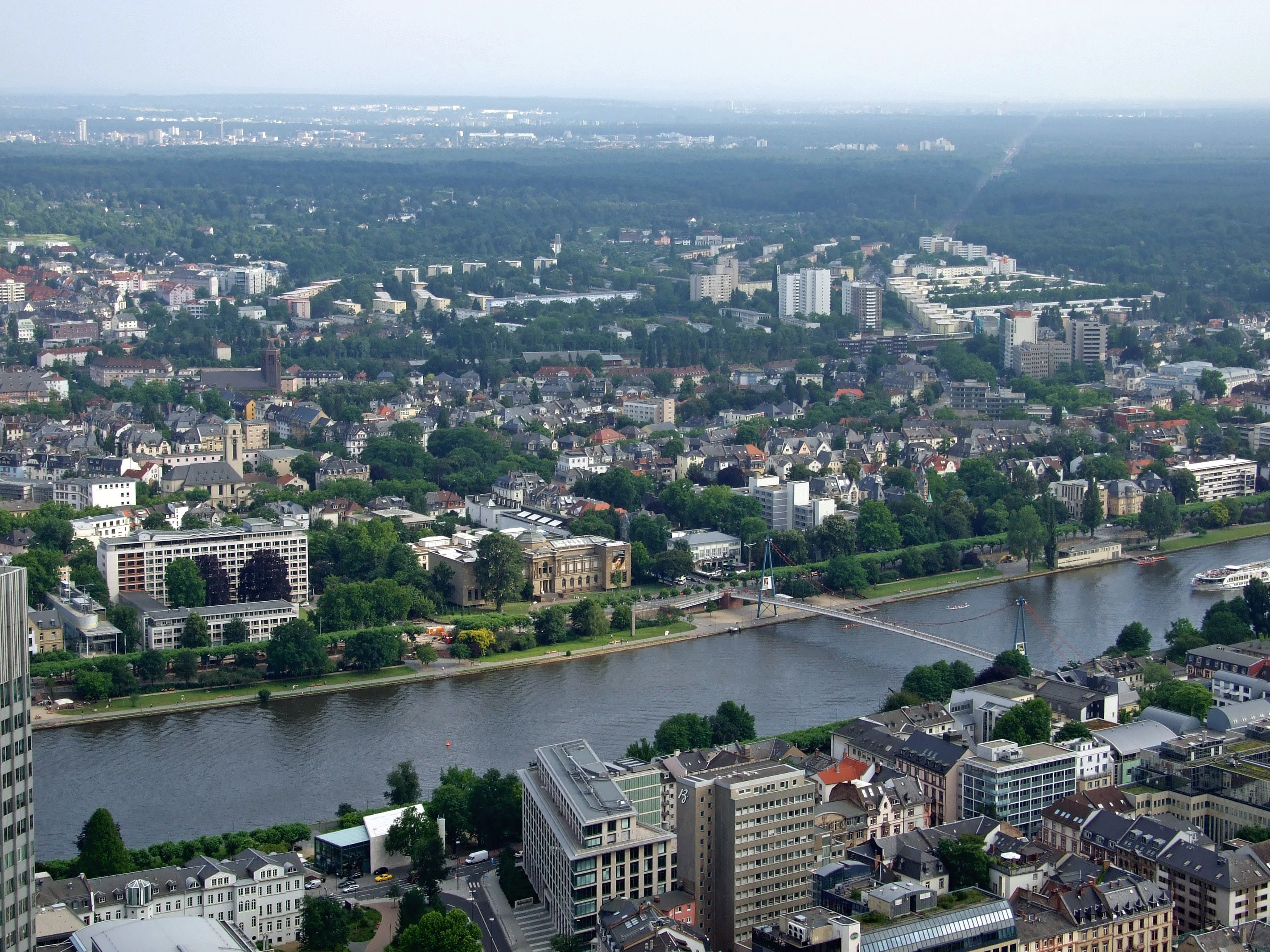 Museum für Kommunikation, Staedel, Liebieghaus und Museum Giersch bilden den dritten (und letzten) Teil des Museumsufers. Links unten sieht man die Rückseite des Jüdischen Museums. Kürzeste Verbindung ist über den Holbeinsteg möglich.